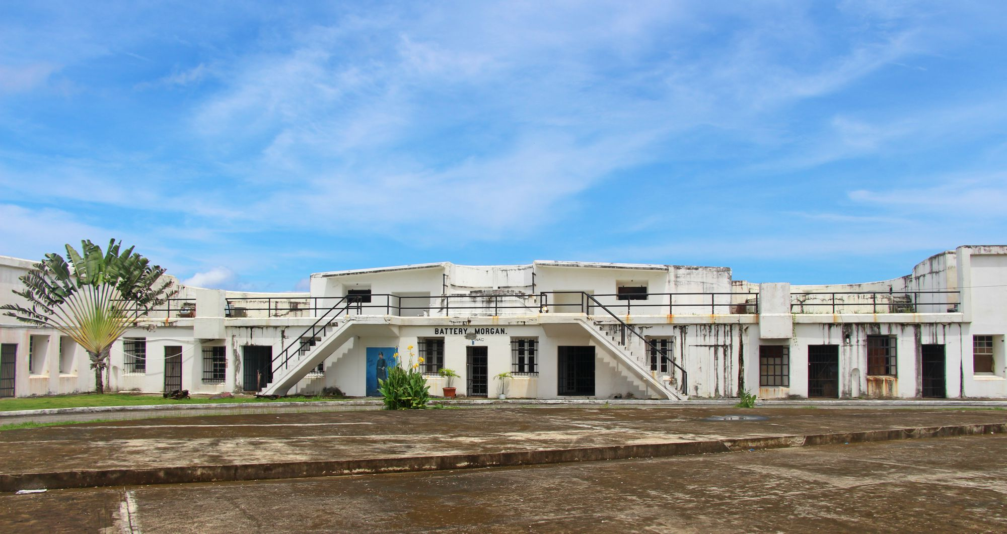 este monumento esta ubicado en calle 2 de colon en esta fotografia se observa la parte central de la battery morgan fort lesseps